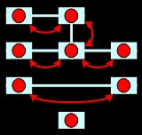 Funktionsweise Verbindungstest